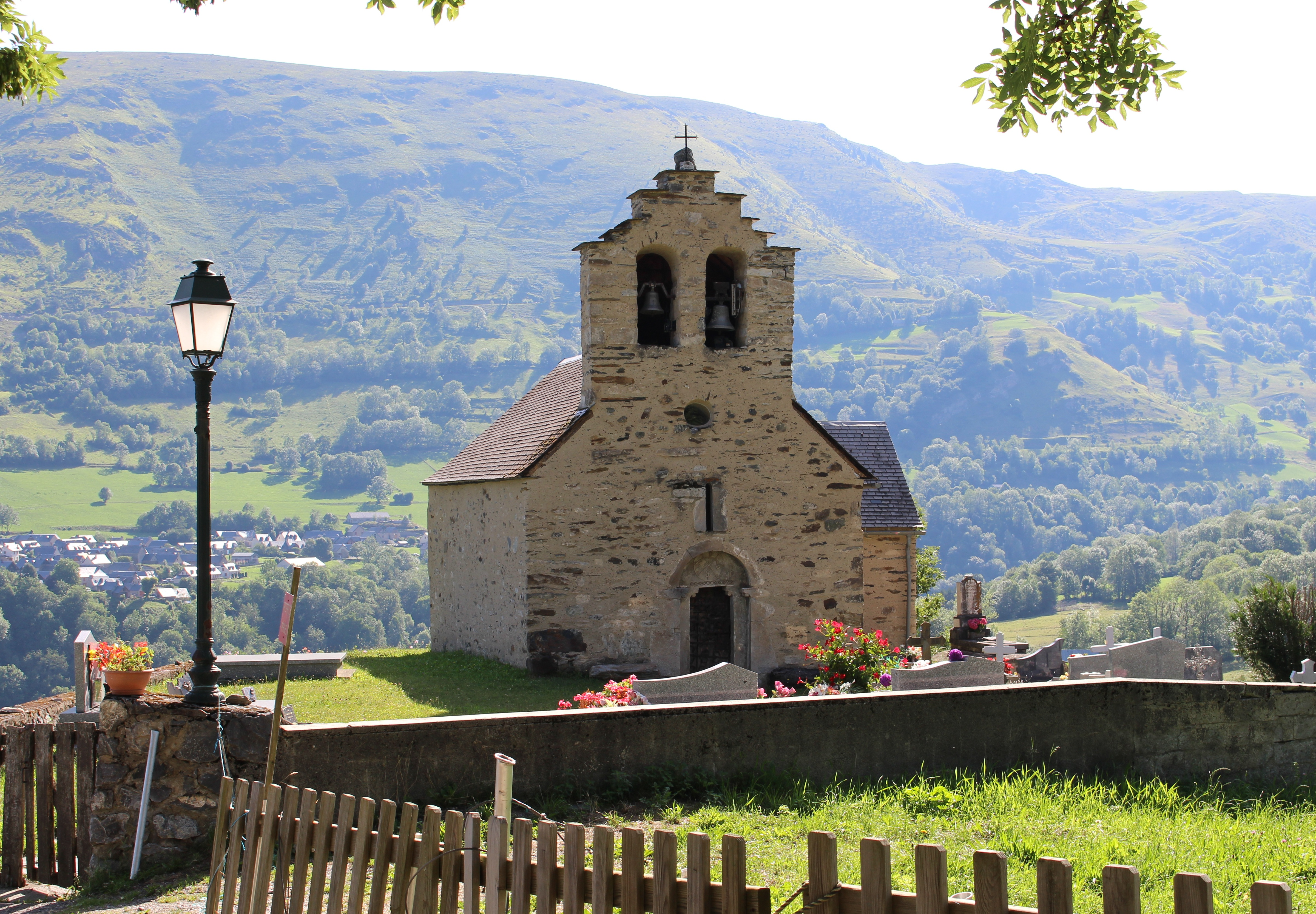 Église l'Invention-de-Saint-Etienne d'Ens (Hautes-Pyrénées)